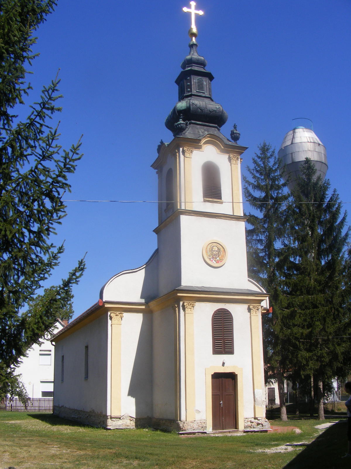 Görögkeleti templom (Lórév, Csarnojevics u. 39. (falu széle))